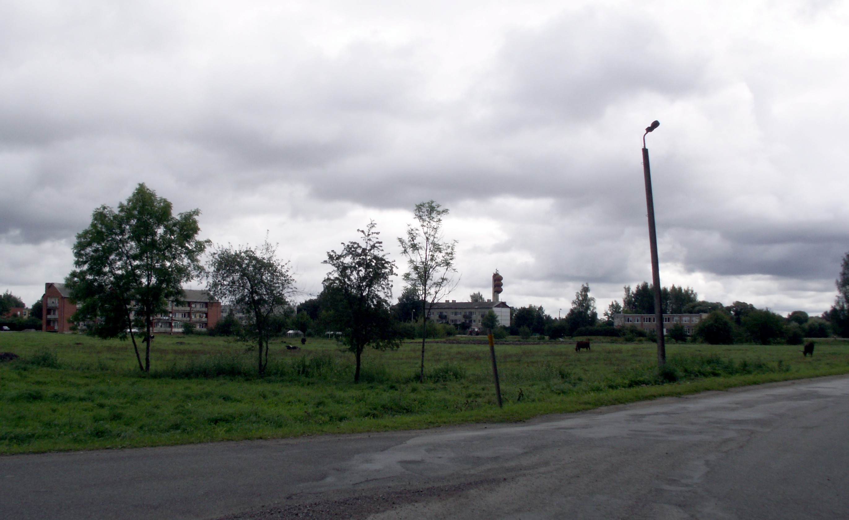 Augštkalnė, Augštkalnės pagastas, Latvija